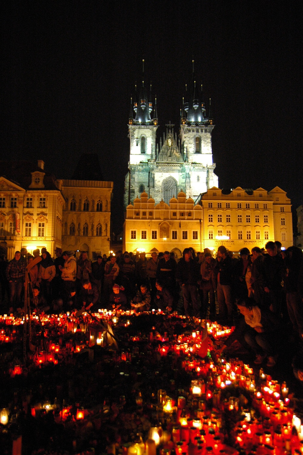 Pour rendre hommage à l'équipe de hockey qui vient de disparaître dans le crash aérien, les passants déposent des bougies sur la Staromestske namesti, la place centrale de Prague. En arrière plan, la célèbre église de Tyn (Matka Bozi pred Tynem sans les accents)